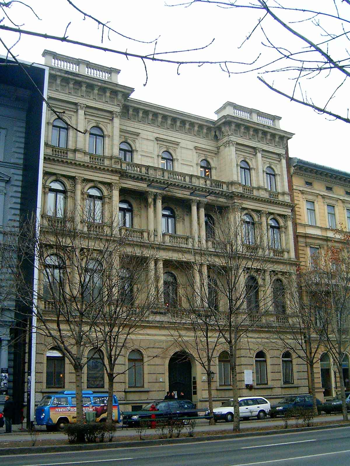 Budapest; Andrássy út 62.